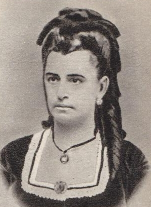 Istoria Teatrului in Romania, Editura Academiei, 1973